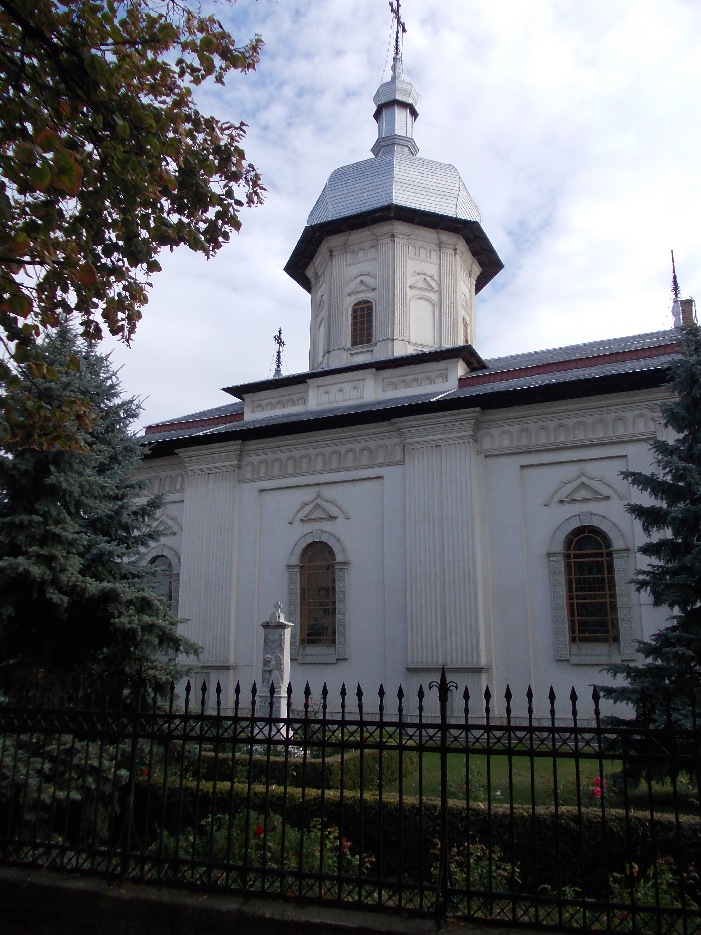 Biserica "Adormirea Maicii Domnului" 01